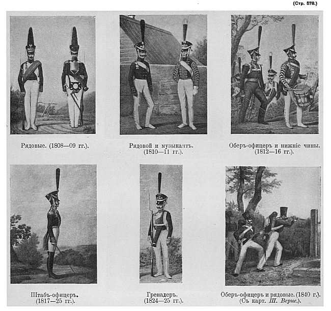 Это изображение было использовано для иллюстрирования статьи «Измайловский лейб-гвардии полк» опубликованной в десятом томе «Военной энциклопедии», который был издан книгоиздательским товариществом И. Д. Сытина в 1912—1913 гг. в столице Российской империи городе Санкт-Петербурге.